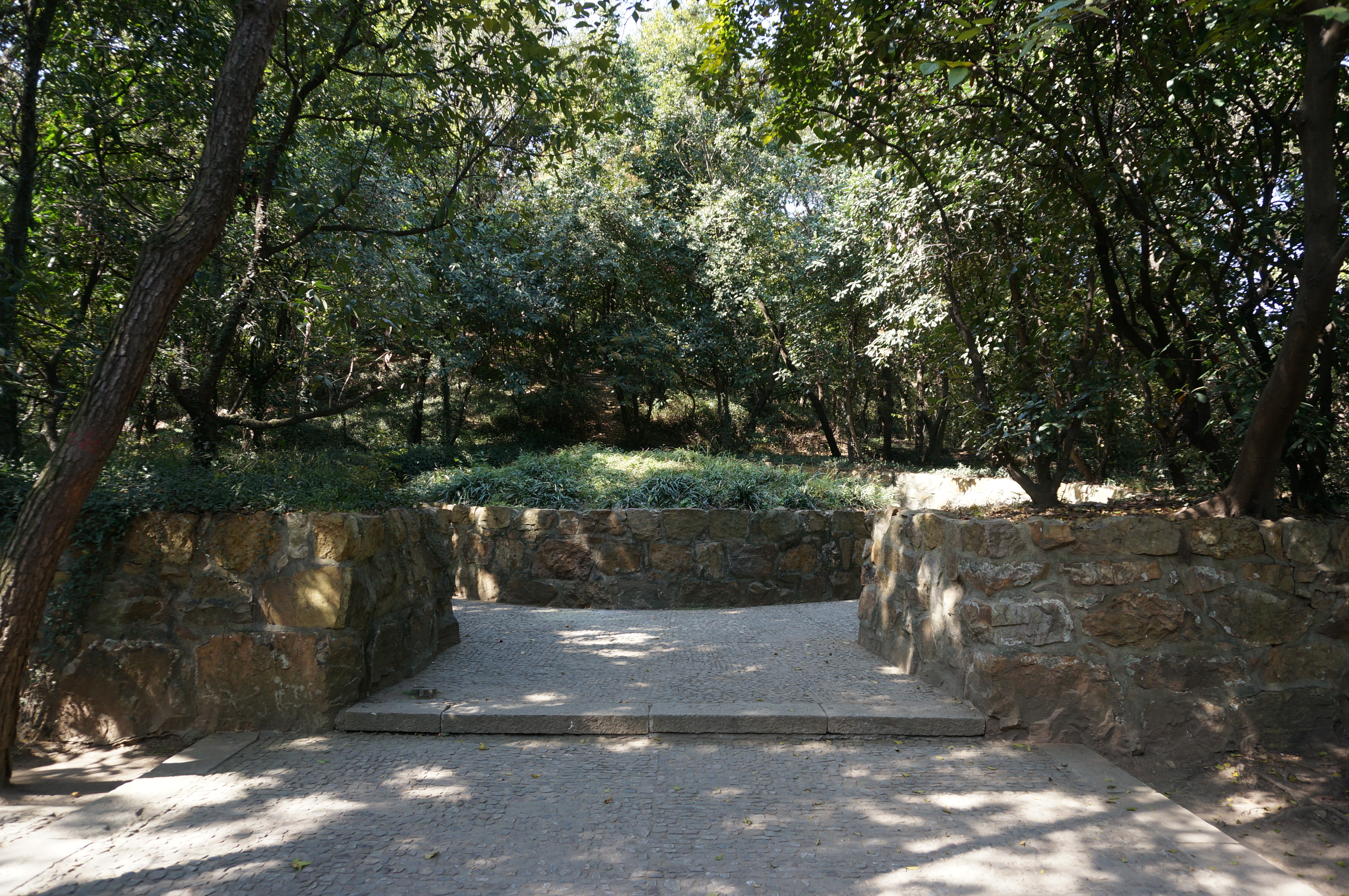 仲雍墓，罗城及墓堆。